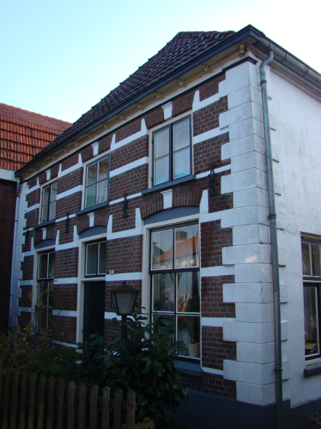 Gemeentemonument in Bredevoort